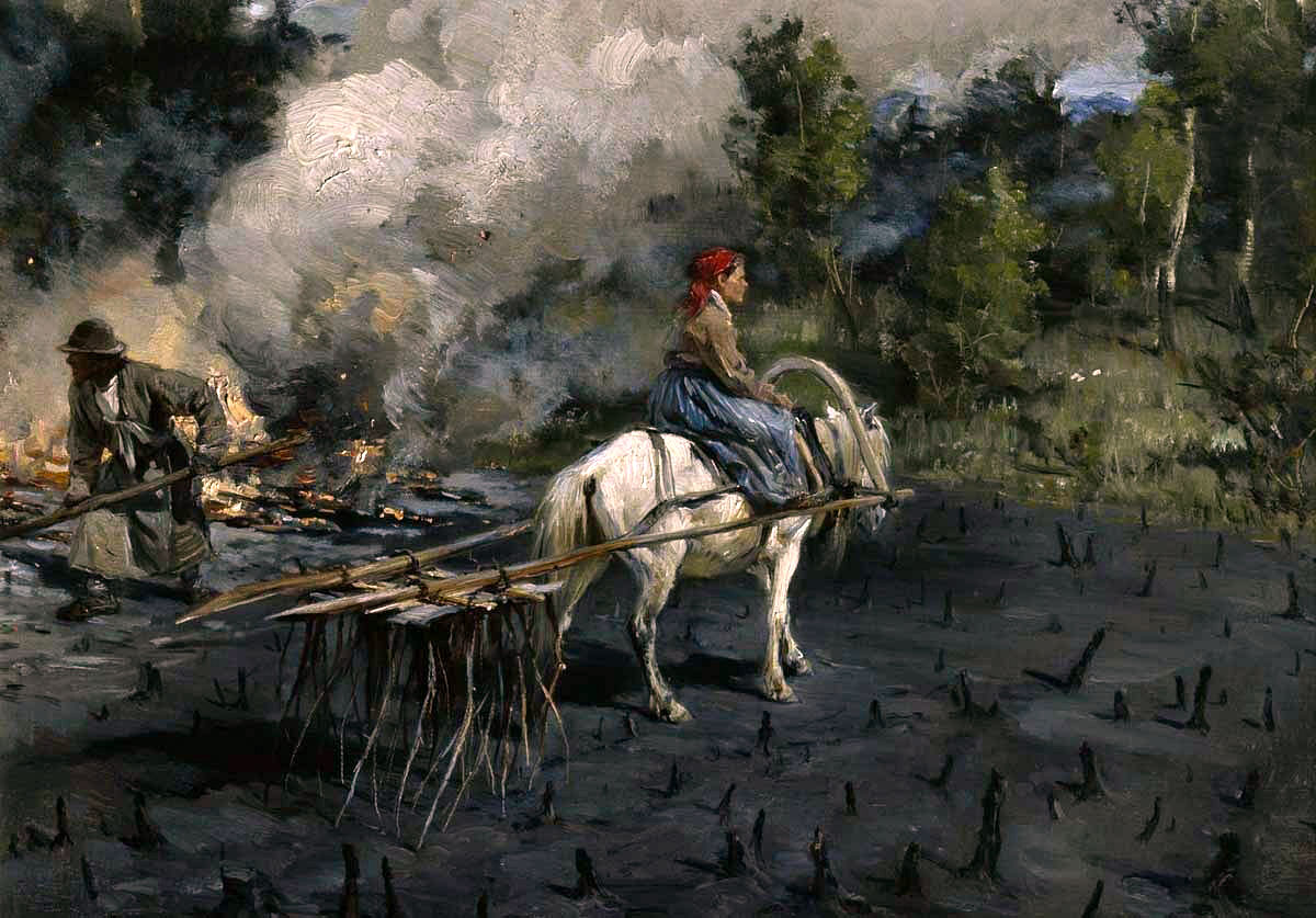 «Приготовление почвы для посева льна в Вологодской губернии» 1887–1890 гг. Государственная Третьяковская галерея, Москва, Россия.